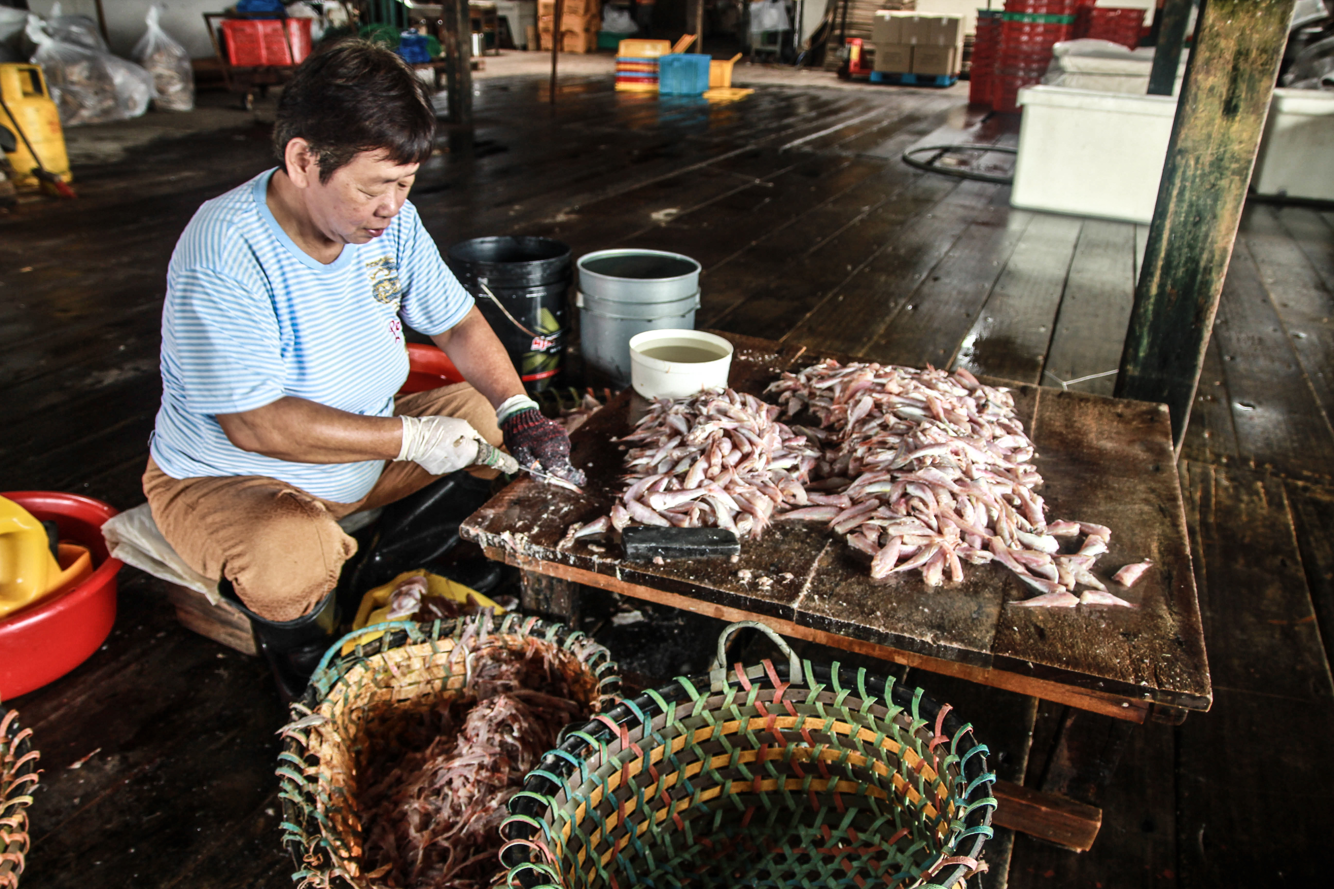 Fisch wird im Hafen von Pangkor bearbeitet. - Pulau Pangkor, Malaysia